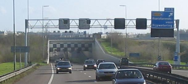 A4 aquaduct ringvaart Haarlemmermeer, april 2005